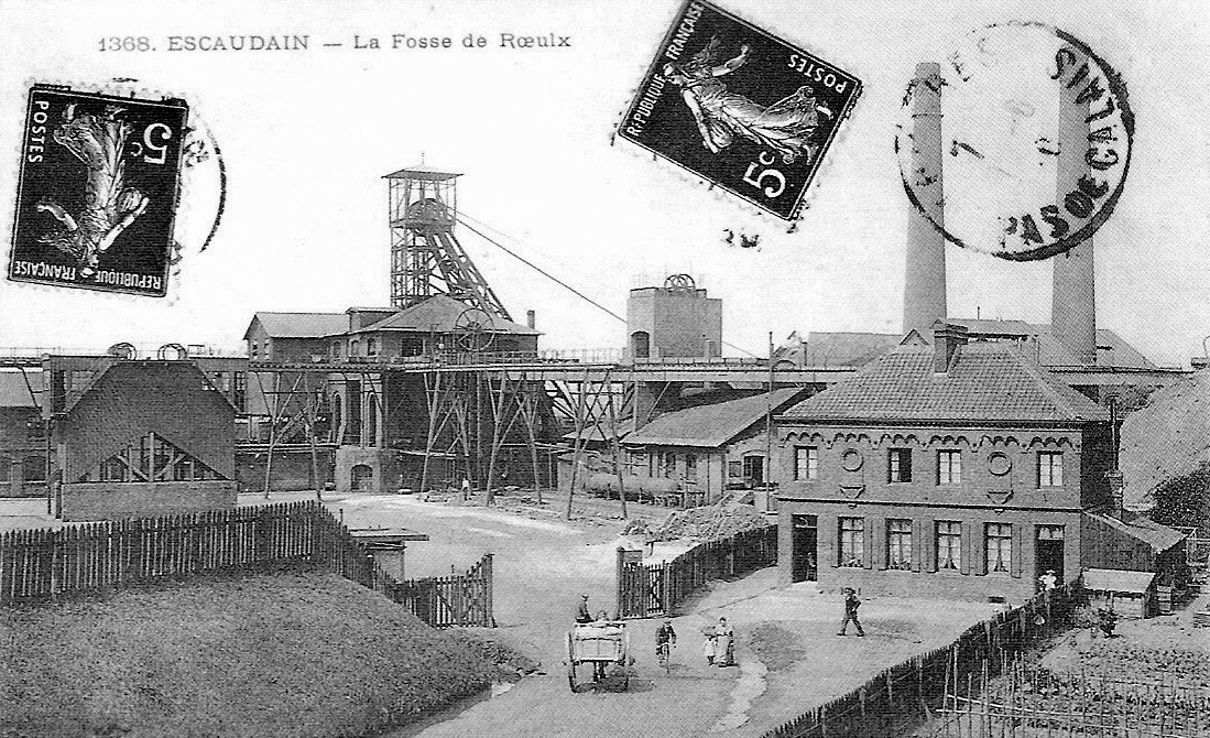 Fosse de Rœulx fermée en 1958